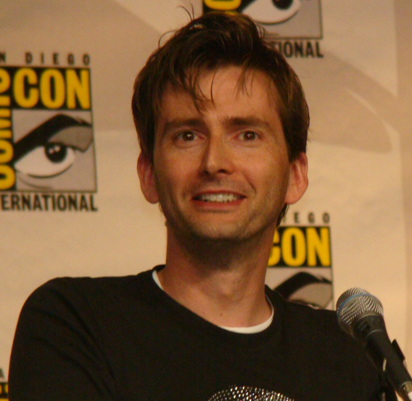 David Tennant